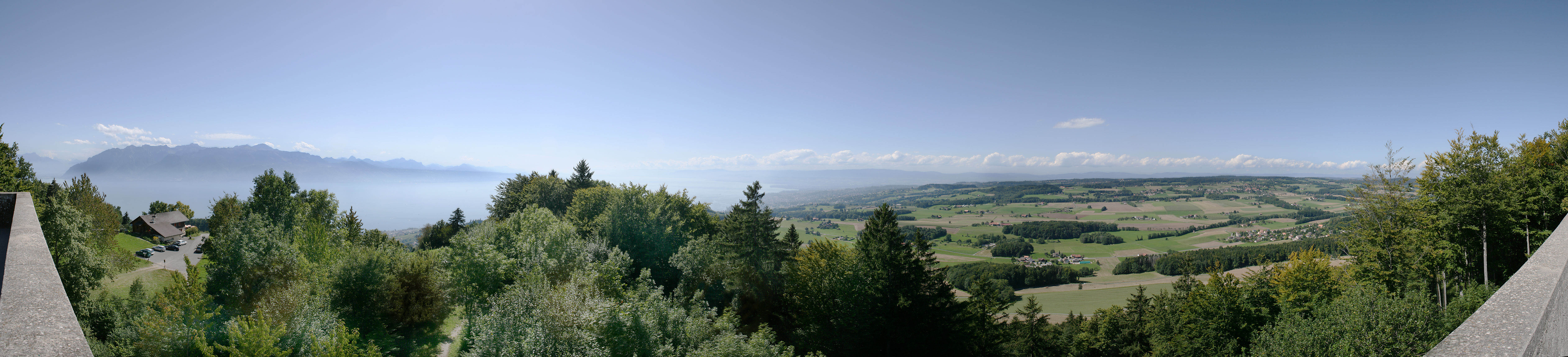 View from Tour de Gourze, Switzerland